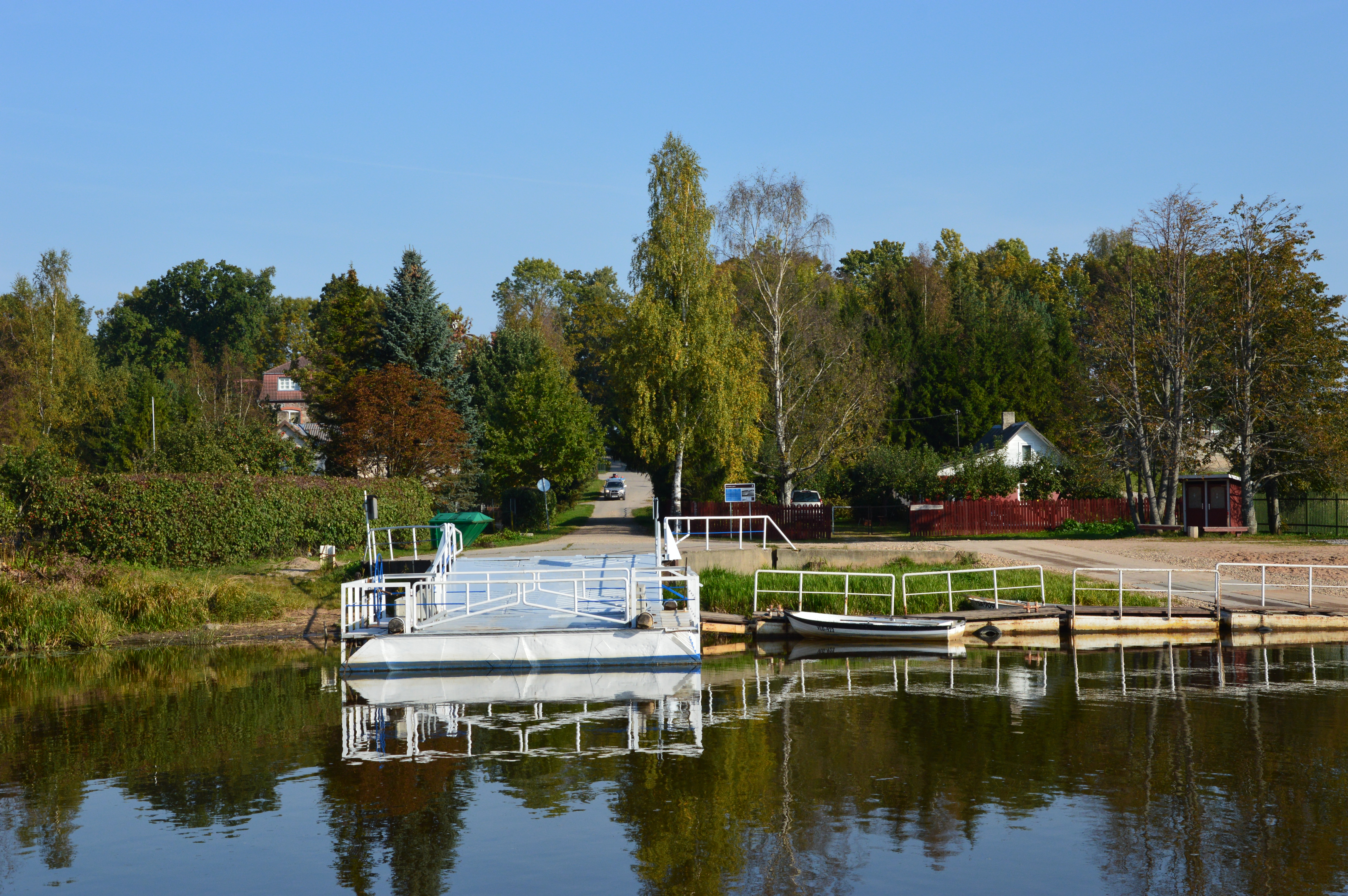 Kavastu vaadatuna teiselt poolt Emajõge.